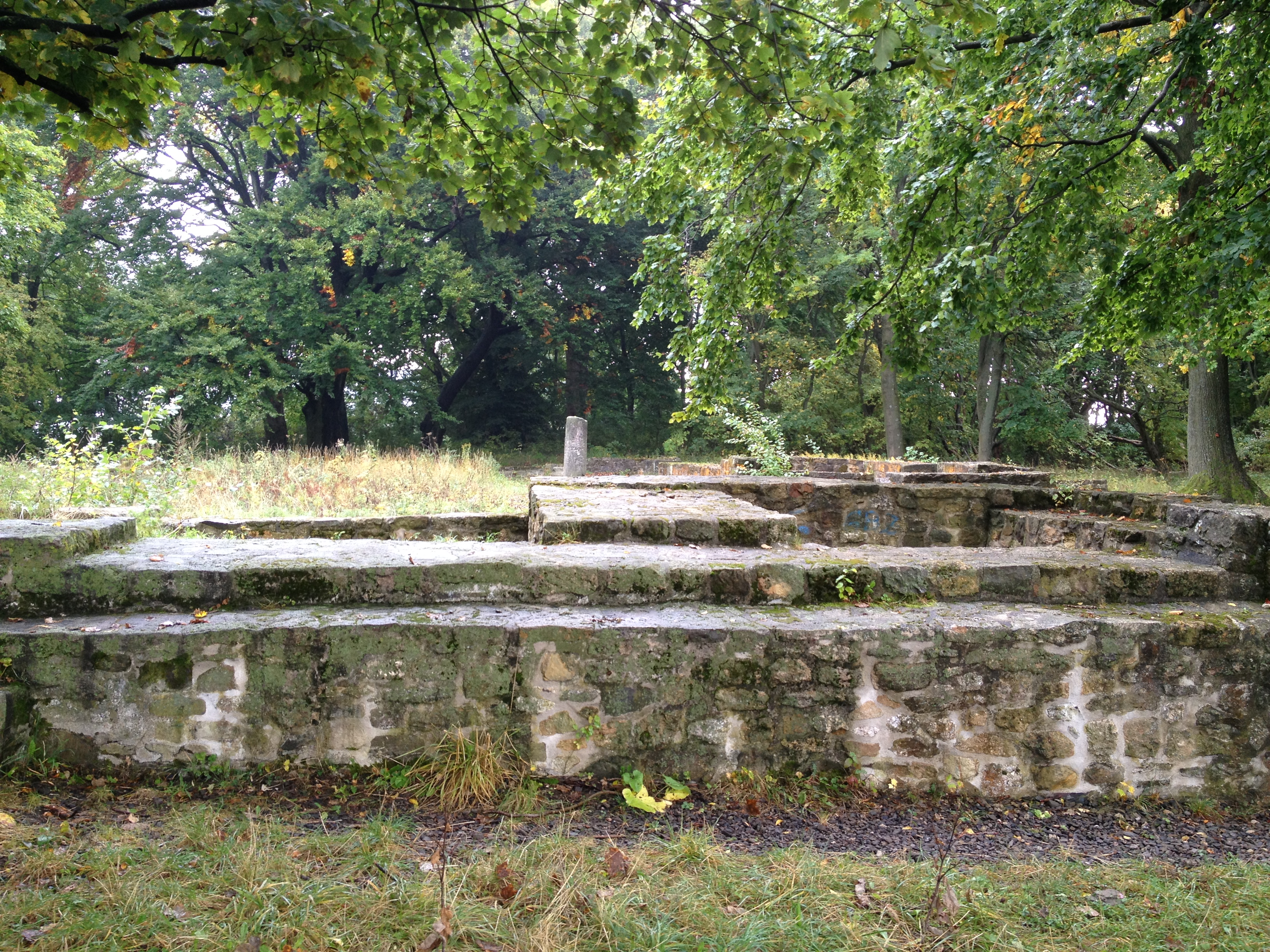 Stiftsruine St. Peter, Goslar, Westwerk